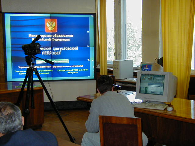 Открытие Всероссийского интернет-педсовета в 2000 году в зале заседаний коллегии Министерства образования России